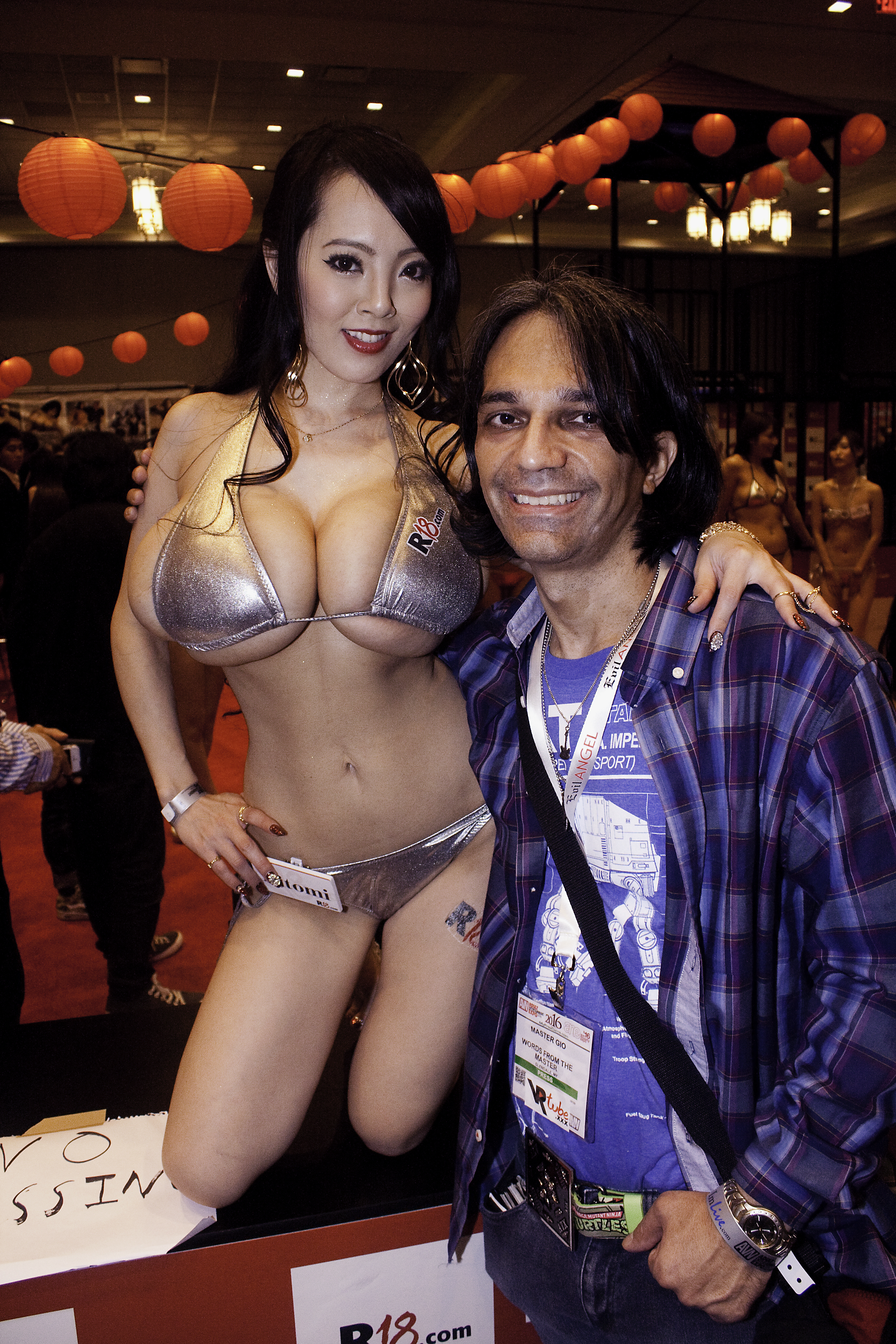 AEE16_0201c